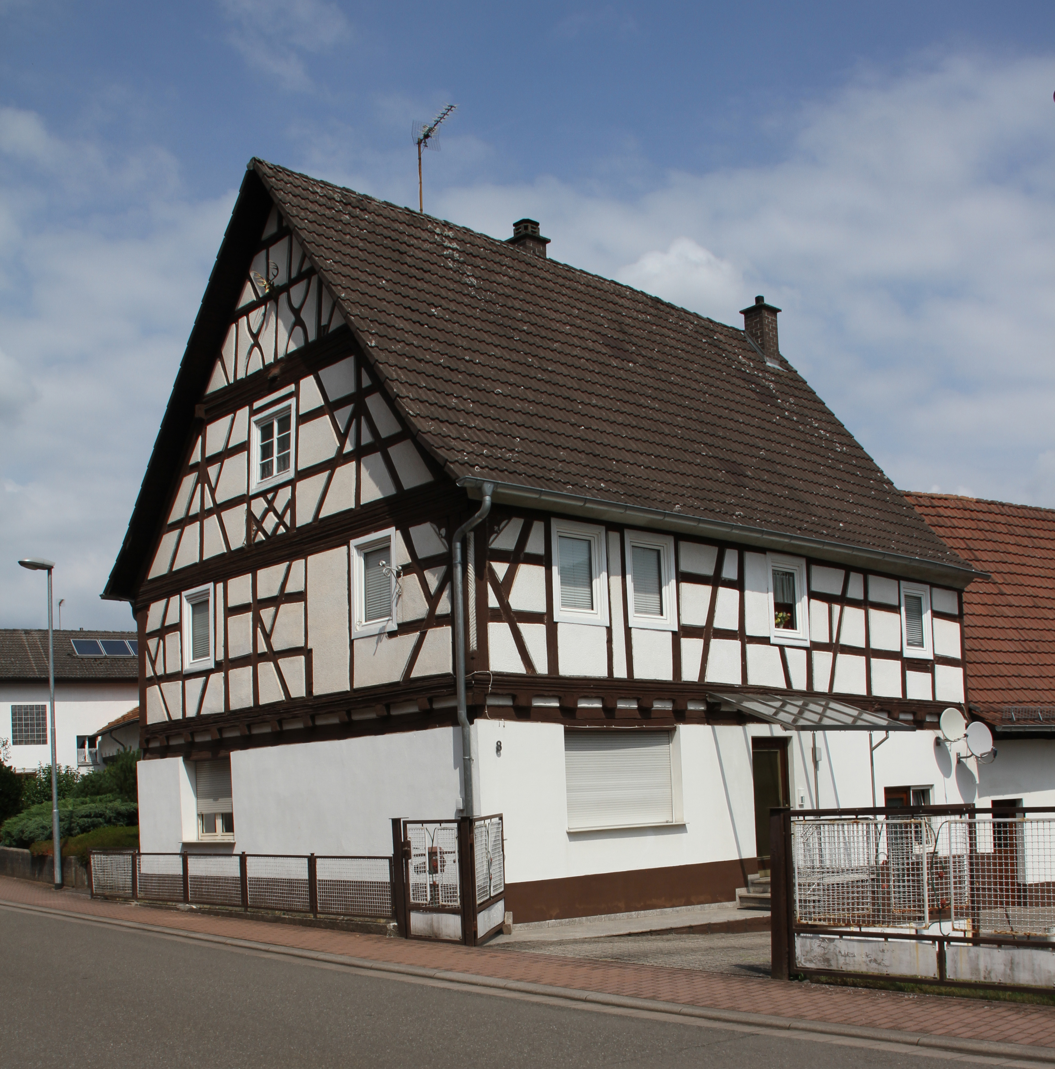 Bruchweiler-Baerenbach-Fachwerkhaus Dorfstraße 8; Fachwerkhaus, teilweise massiv, 18. Jahrhundert.